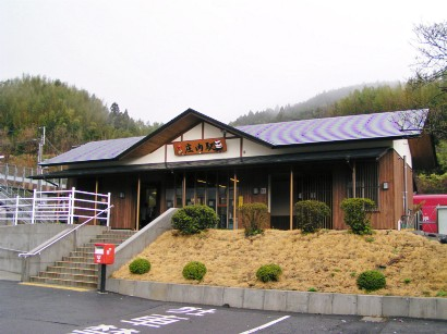 2005年3月28日に投稿者が庄内駅にて撮影。